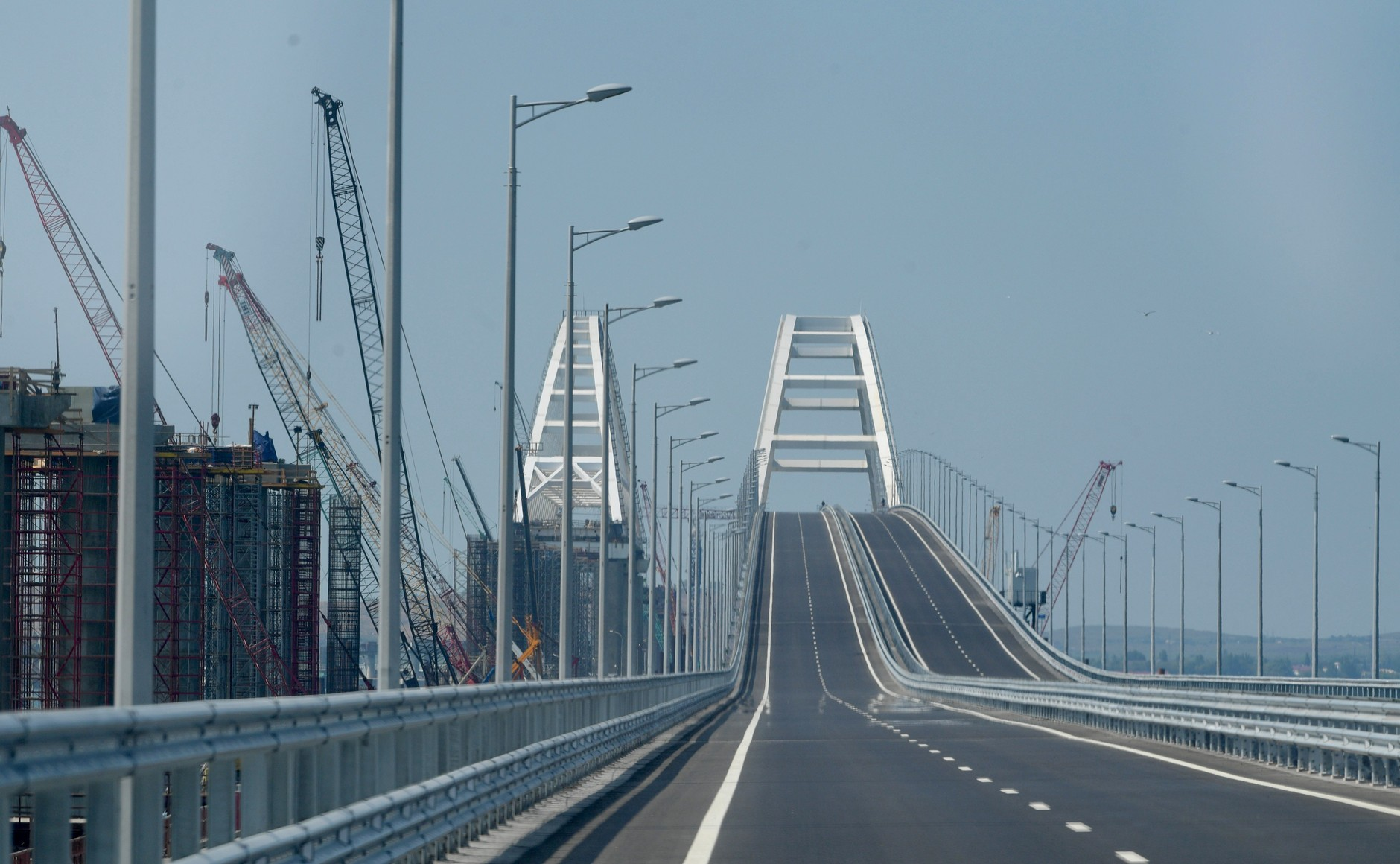 Открытие автодорожной части Крымского моста